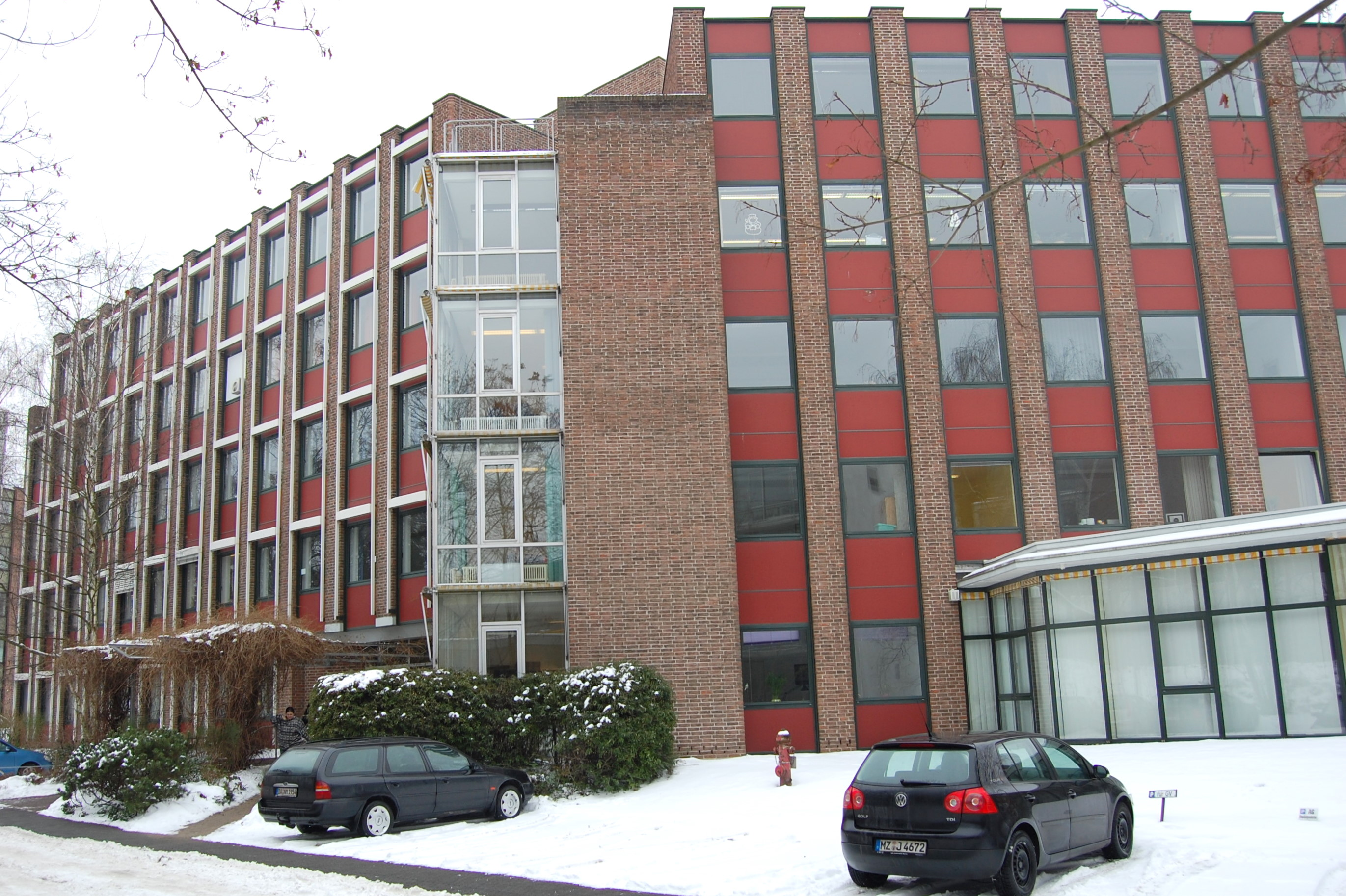 Gebäude des Amtsgerichts Darmstadt in der Julius-Reiber-Str. 15